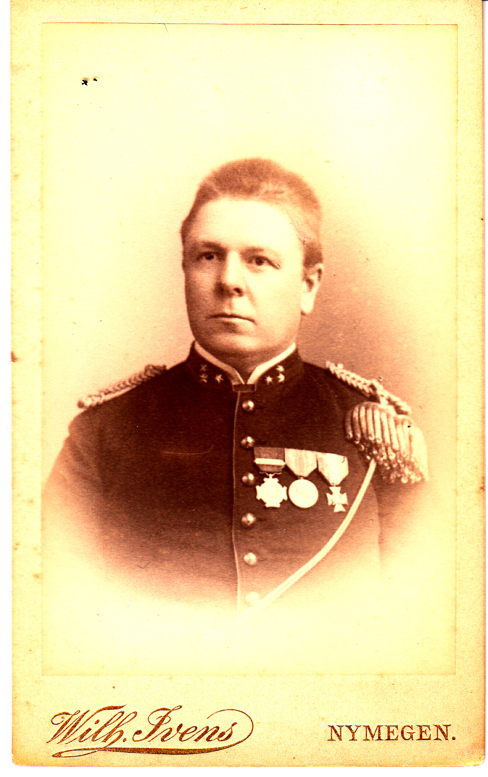 Hendrik van der Wedden, Nederlands politiecommissaris